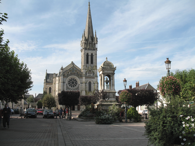 Description du contenu : Eglise de la Ville de BRIARE 45250, réputée pour les émaux de Braire et le Pont Canal en fer. Source : « œuvre personnelle » (own work en anglais). Date de publication 30/12/2006. Auteur du fichier : Michel CLAIR